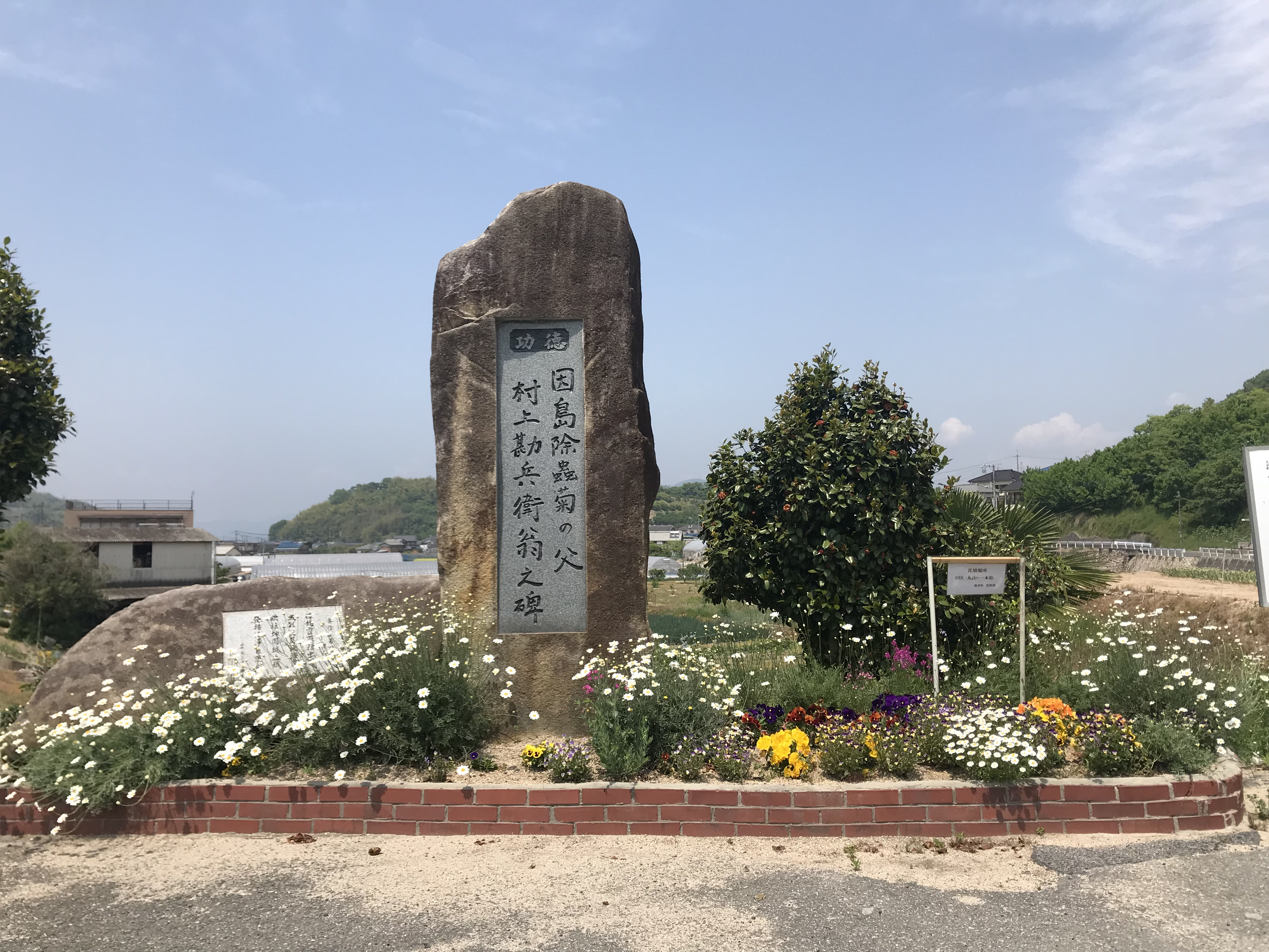 因島除虫菊の父・村上勘兵衛翁之碑